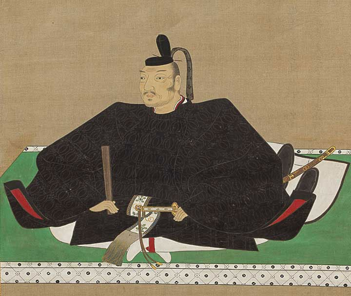 中井正清の肖像。